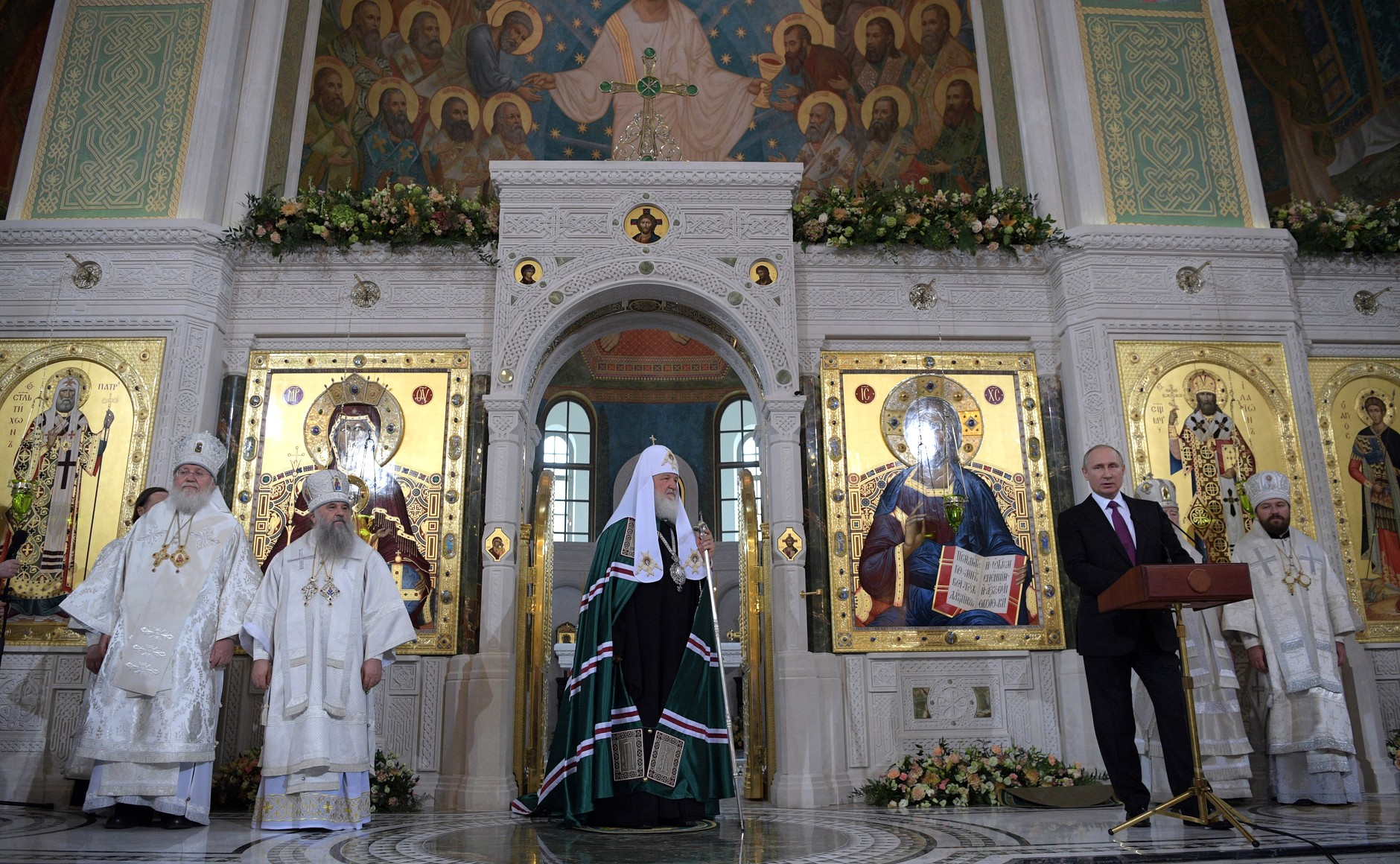 Выступление Президента России Владимира Путина на церемонии освящения храма Воскресения Христова и Новомучеников и Исповедников Церкви Русской в московском Сретенском монастыре